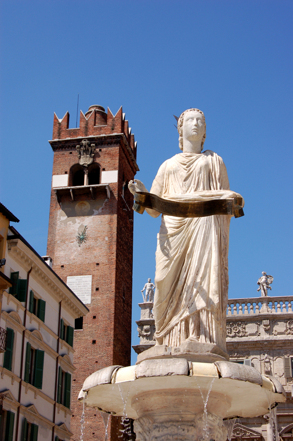 La statua di Madonna Verona in Piazza delle Erbe a Verona.